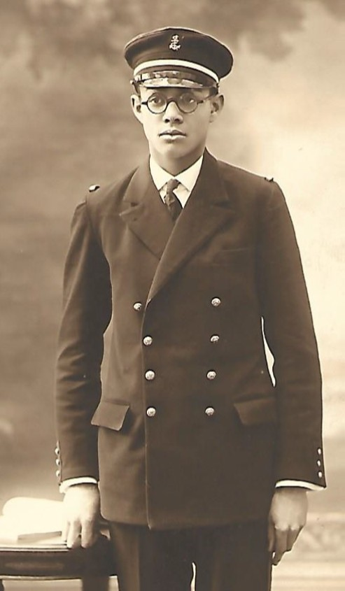 Photo de jeunesse, en tout début de carrière militaire, d'un futur Compagnon de la Libération